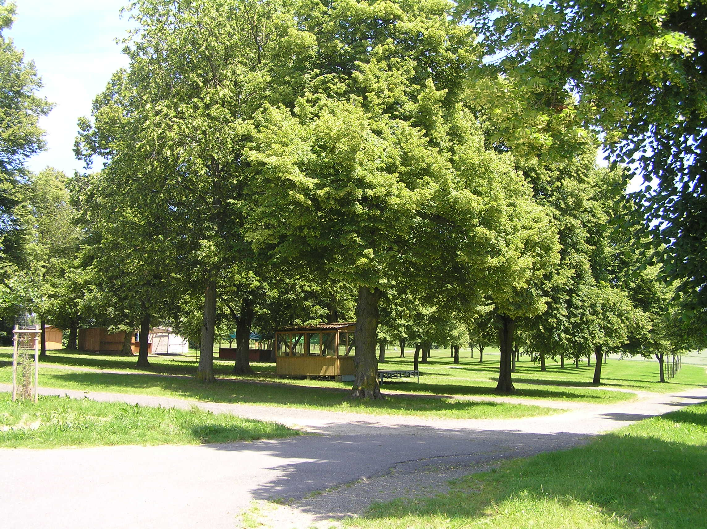 Marktgelände des Alteburger Marktes (außerhalb der Marktzeit). Früher lag hier das Kastell Alteburg